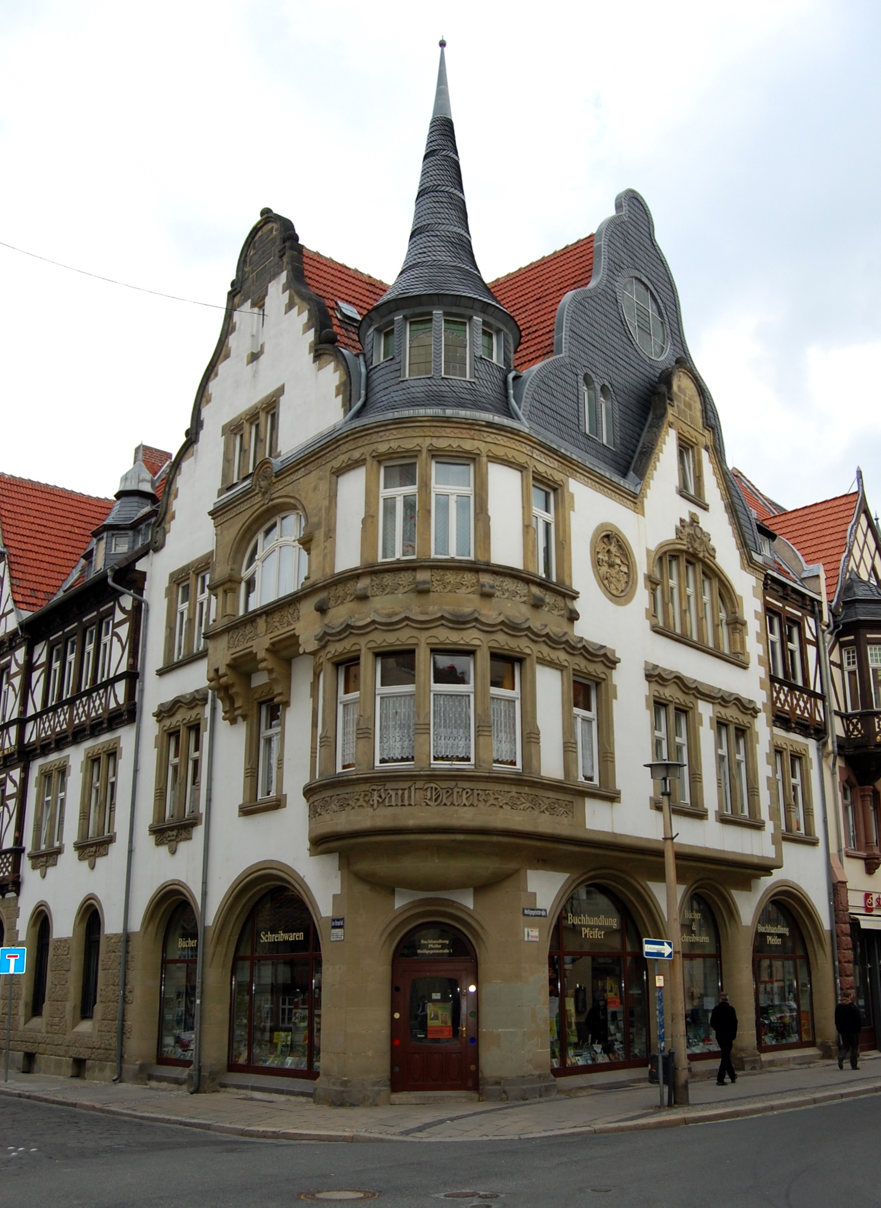 Quedlinburg, Heiligegeistraße 1